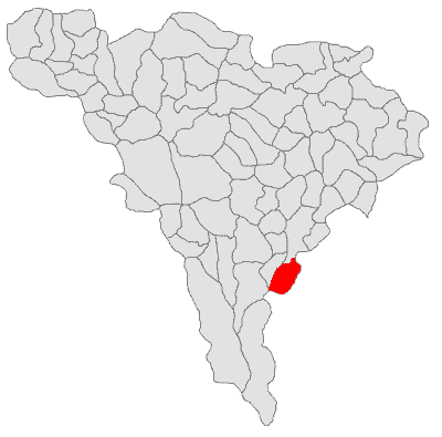 Categorie:Hărţi ale judeţului Alba